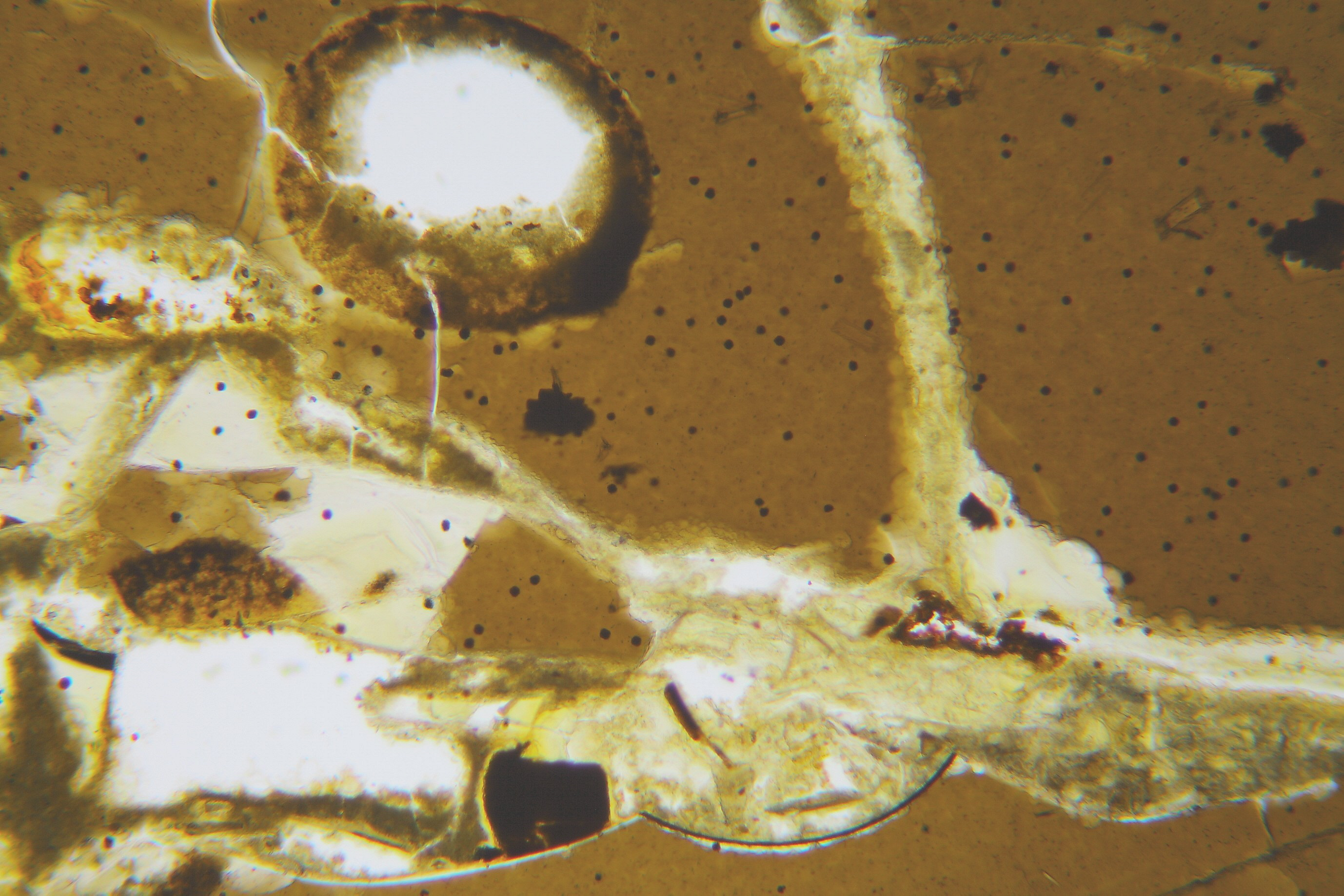 Palagonit (Dünnschliff, LPL): Von Sprüngen und Blasenräumen beginnende Umwandlung des vulkanischen Glases in andere Minerale